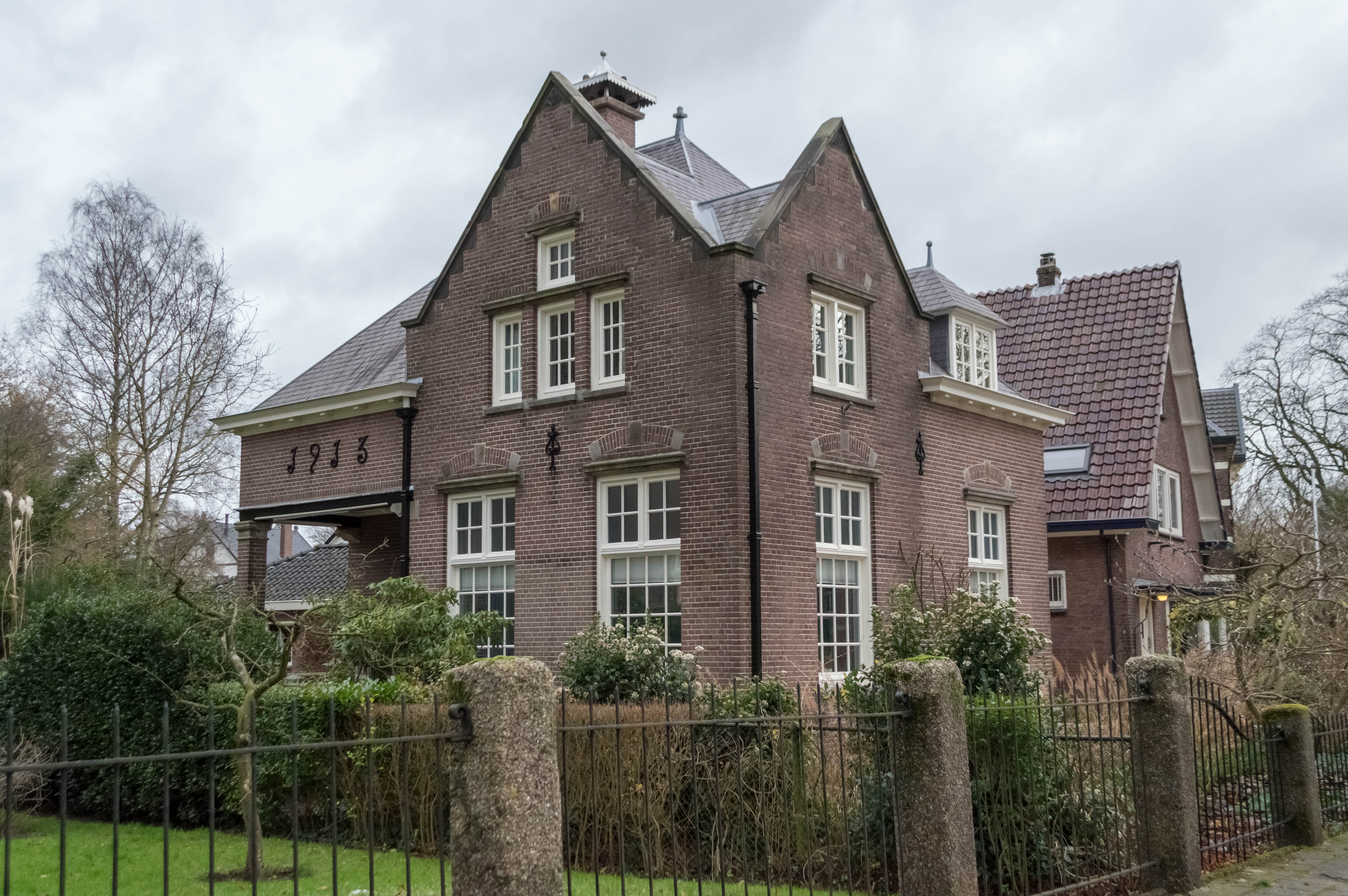 De voormalige congiërgewoning op Kastanjelaan 8.